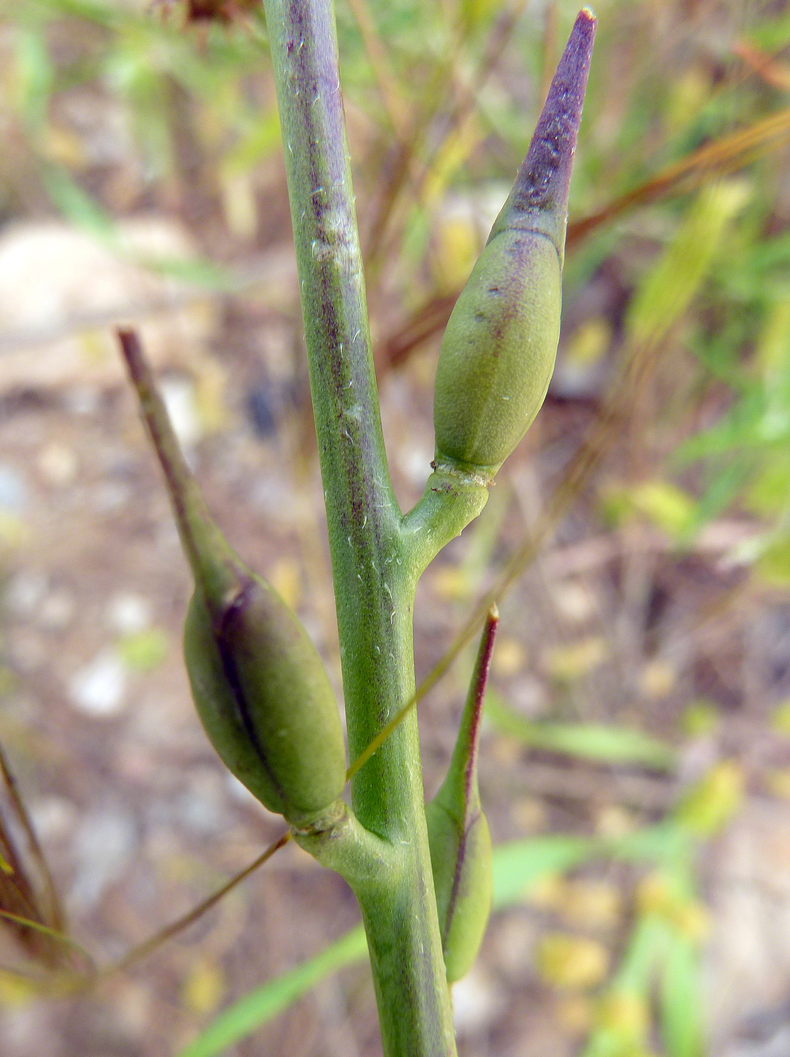 Eruca vesicaria (oruga) - Silicuas inmaduras in situ. - circa Villa Suzana, Colonia Ilicitana, Albatera (Provincia de Alicante, España).